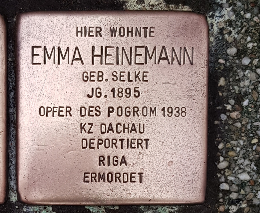 Ort: Bechemstr. 4, 47058 Duisburg-Duissern